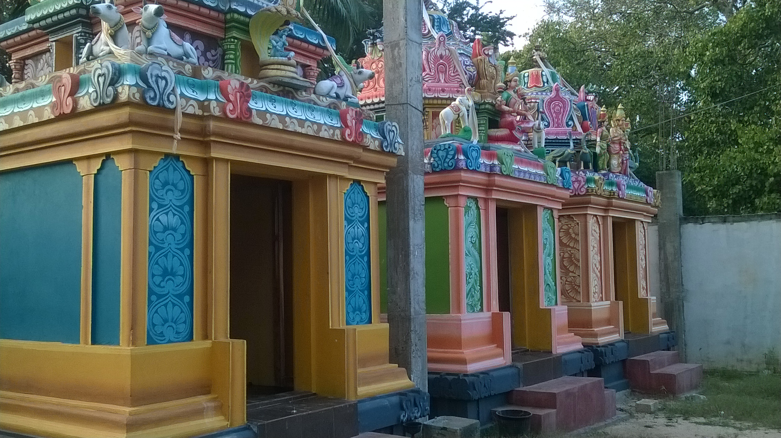 பரிவார தெய்வங்கள்